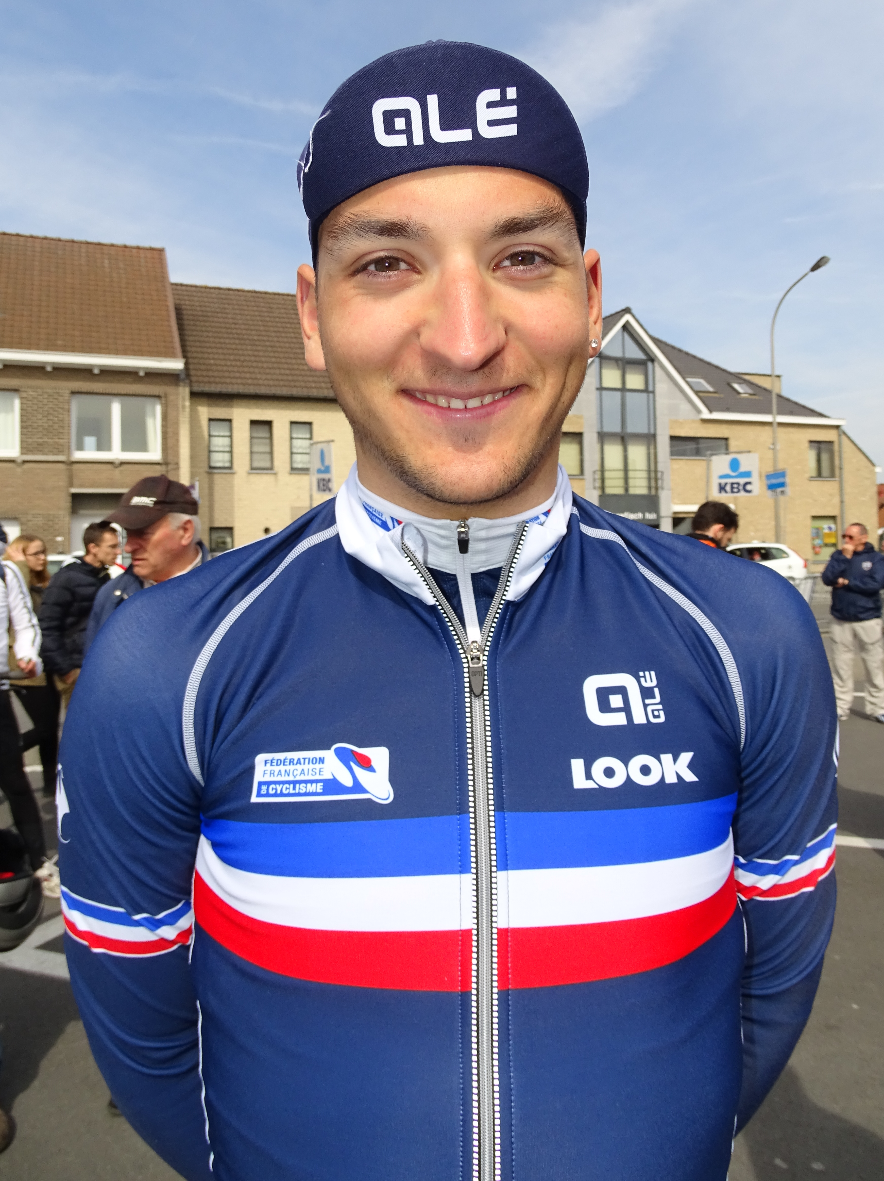 Reportage réalisé le samedi 9 avril à l'occasion du départ et de l'arrivée du Tour des Flandres espoirs 2016 à Audenarde, Belgique.